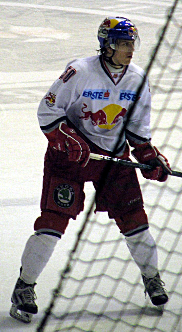 Mario Fischer